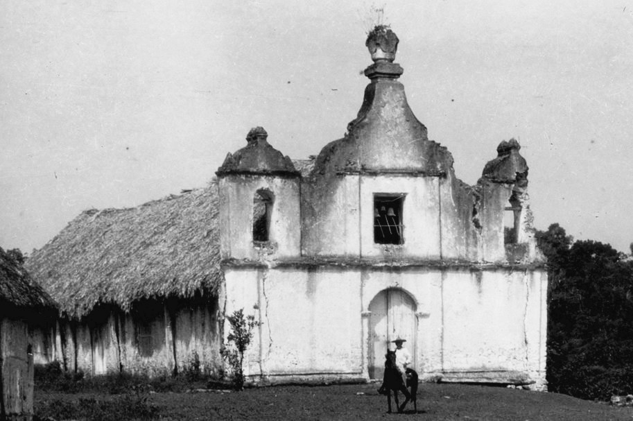 Iglesia del municipio de Dolores, Petén en 1915.